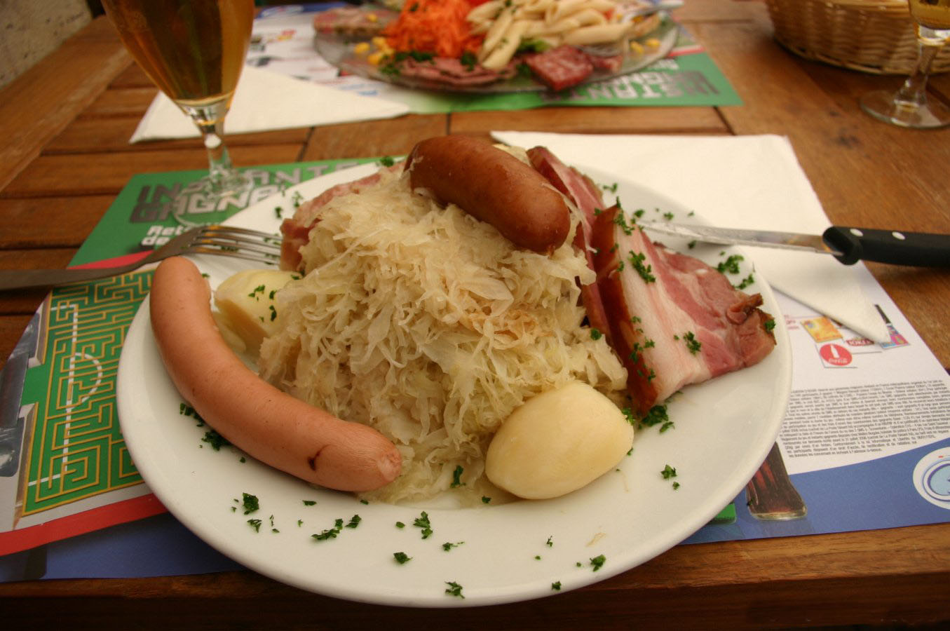 Choucroute garni (Sauerkraut mit Beilage)